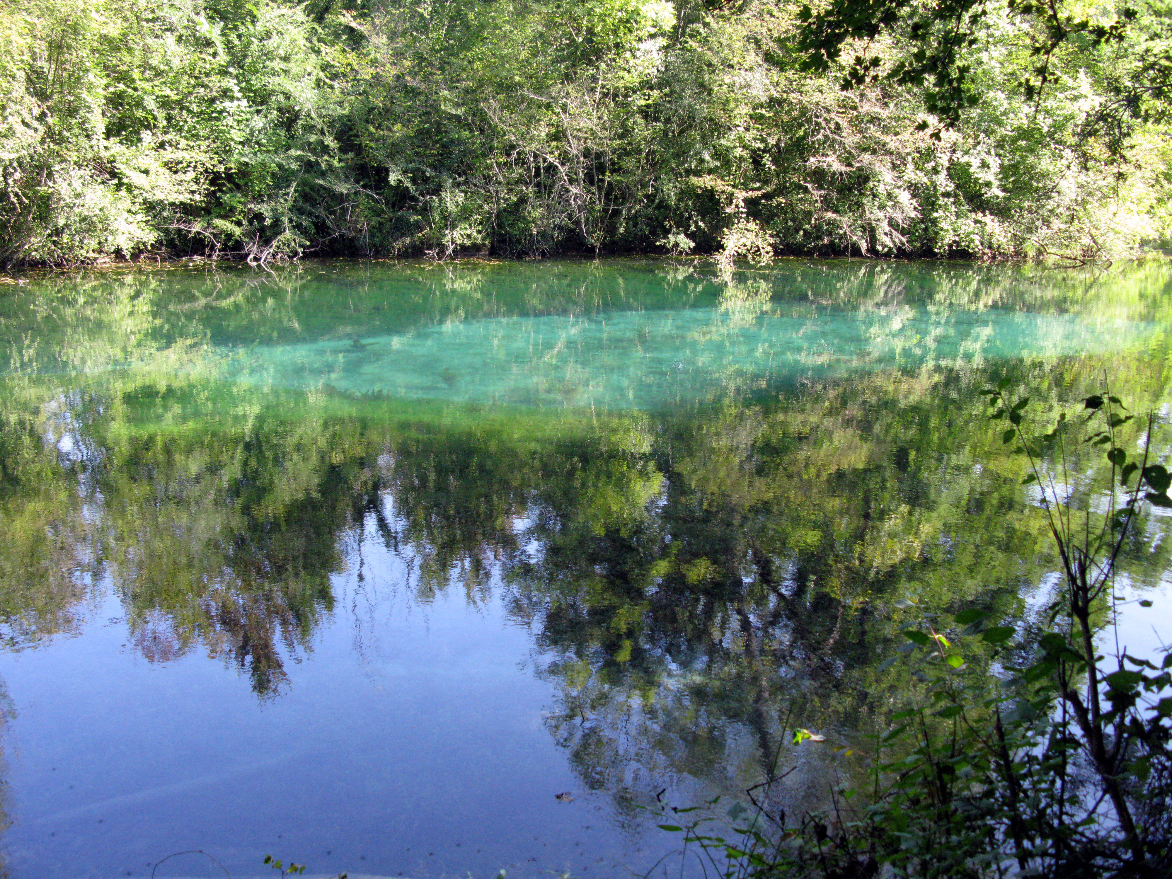 Naturschutzgebiet Rappennestgießen bei Burkheim am Kaiserstuhl